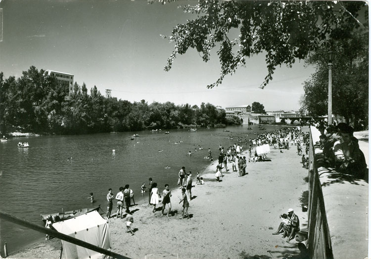 Playa del Pisuerga - Valladolid - Postal Color